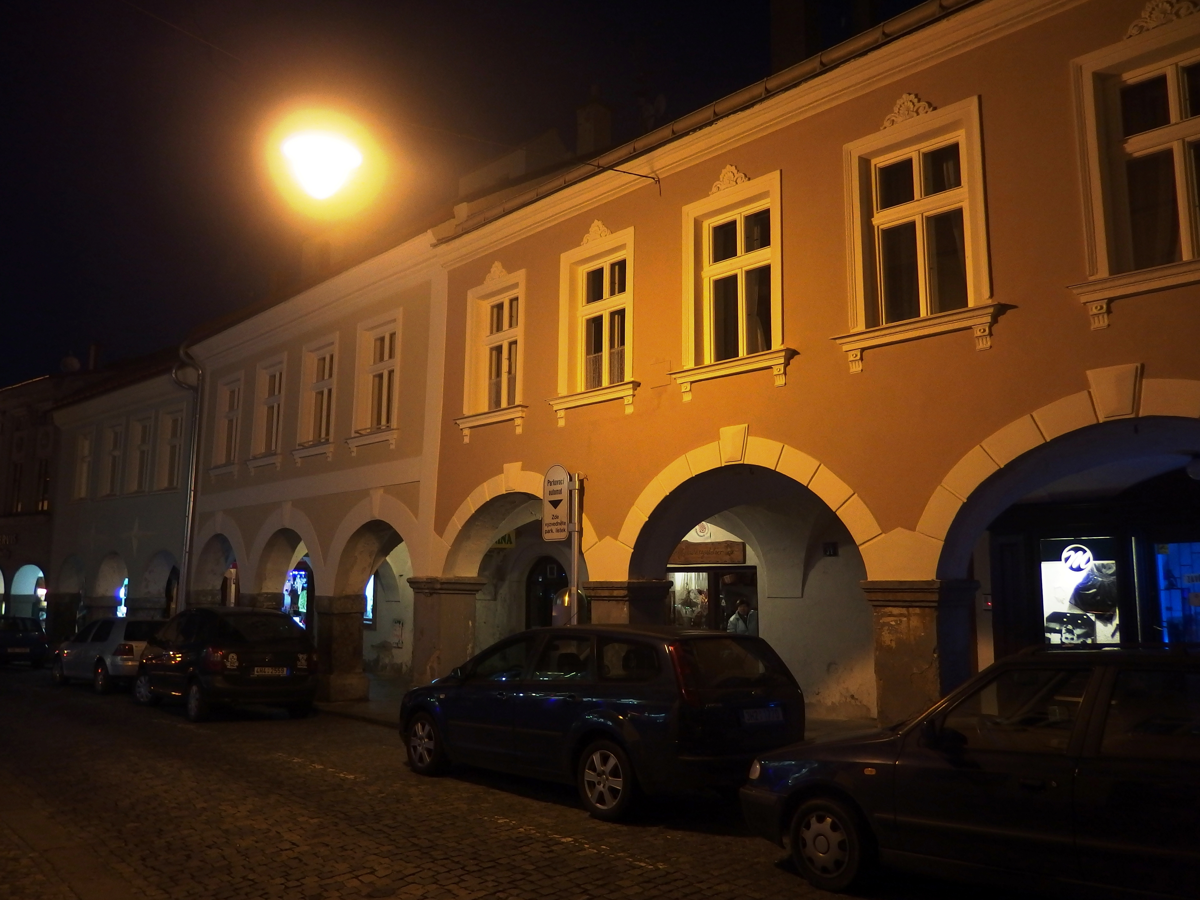 Dům čp. 31, Jihoslovanská 31, Vnitřní Město, Trutnov.